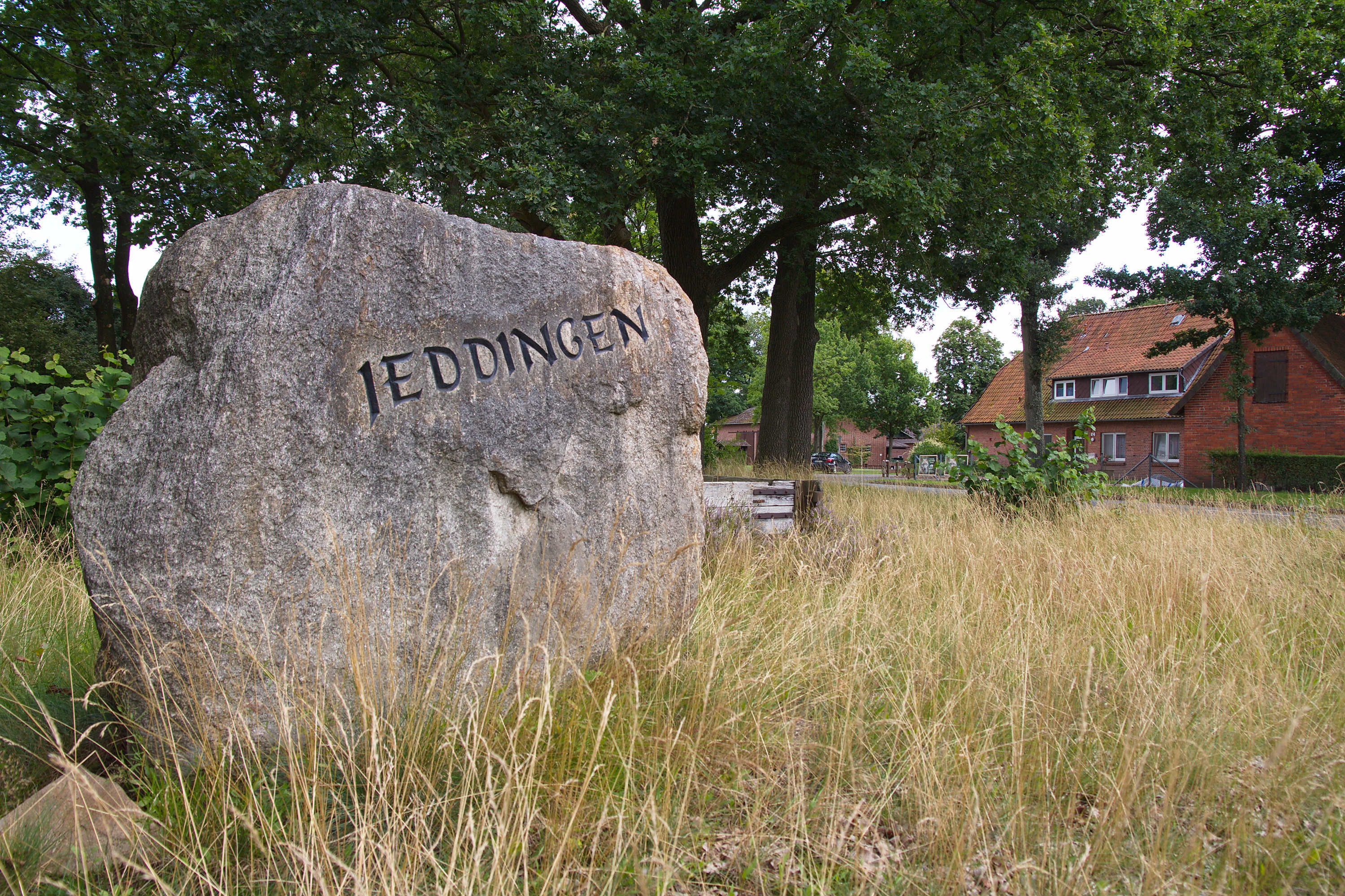 Gedenkstein in Jeddingen (Visselhövede), Niedersachsen, Deutschland